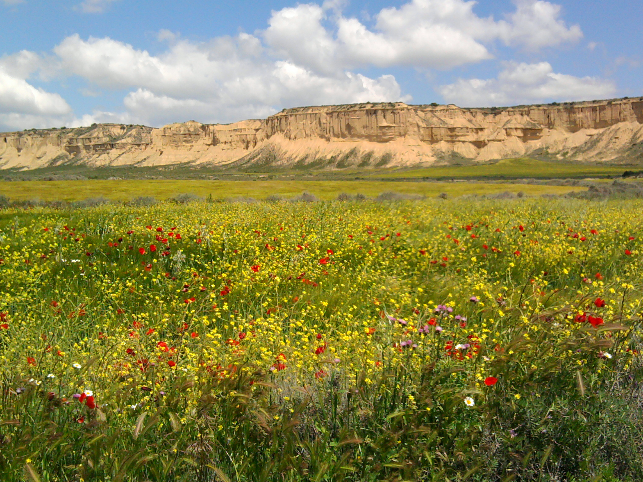 Bardenas Reales en primavera This is a photography of a Site of Community Importance in Spain with the ID: ES2200037. Natura2000 entry, EEA entry